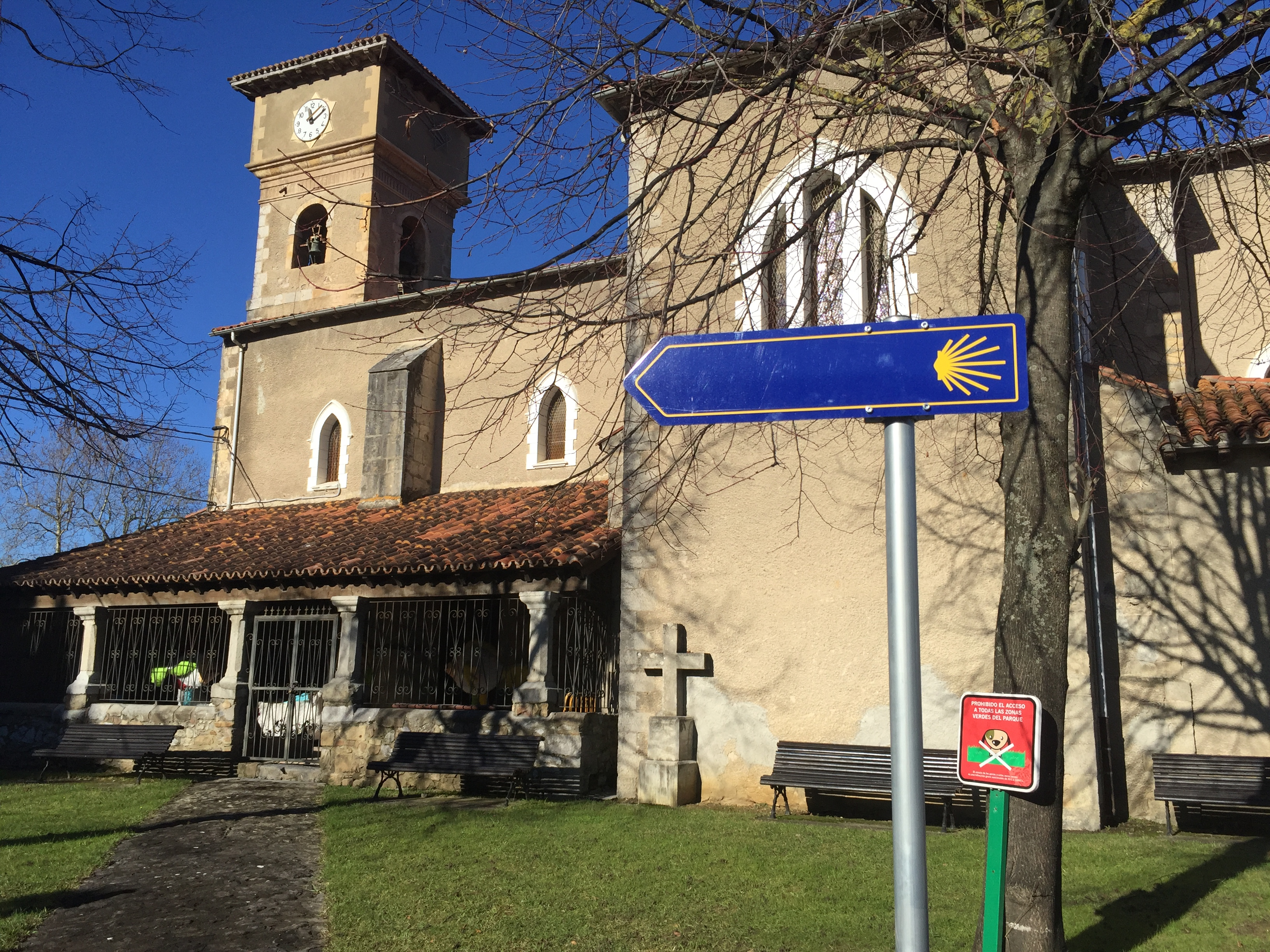 Camino de Santiago a su paso por Santullán